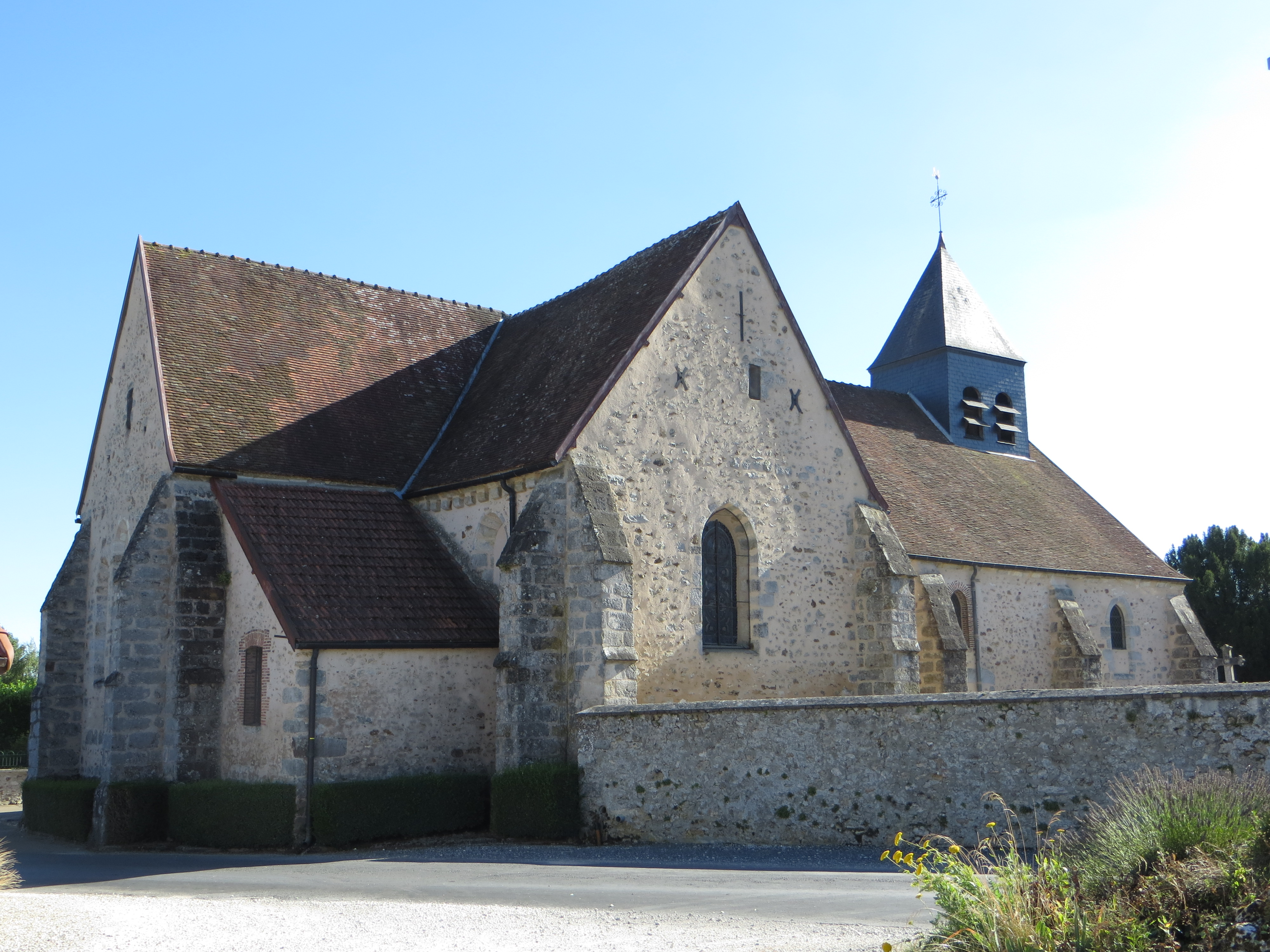 Vue générale de l'église